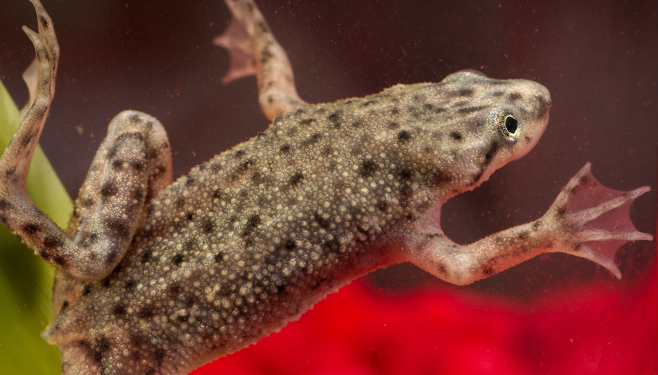 cutted and cropped version of File:African dwarf frog.jpg, edited by B kimmel